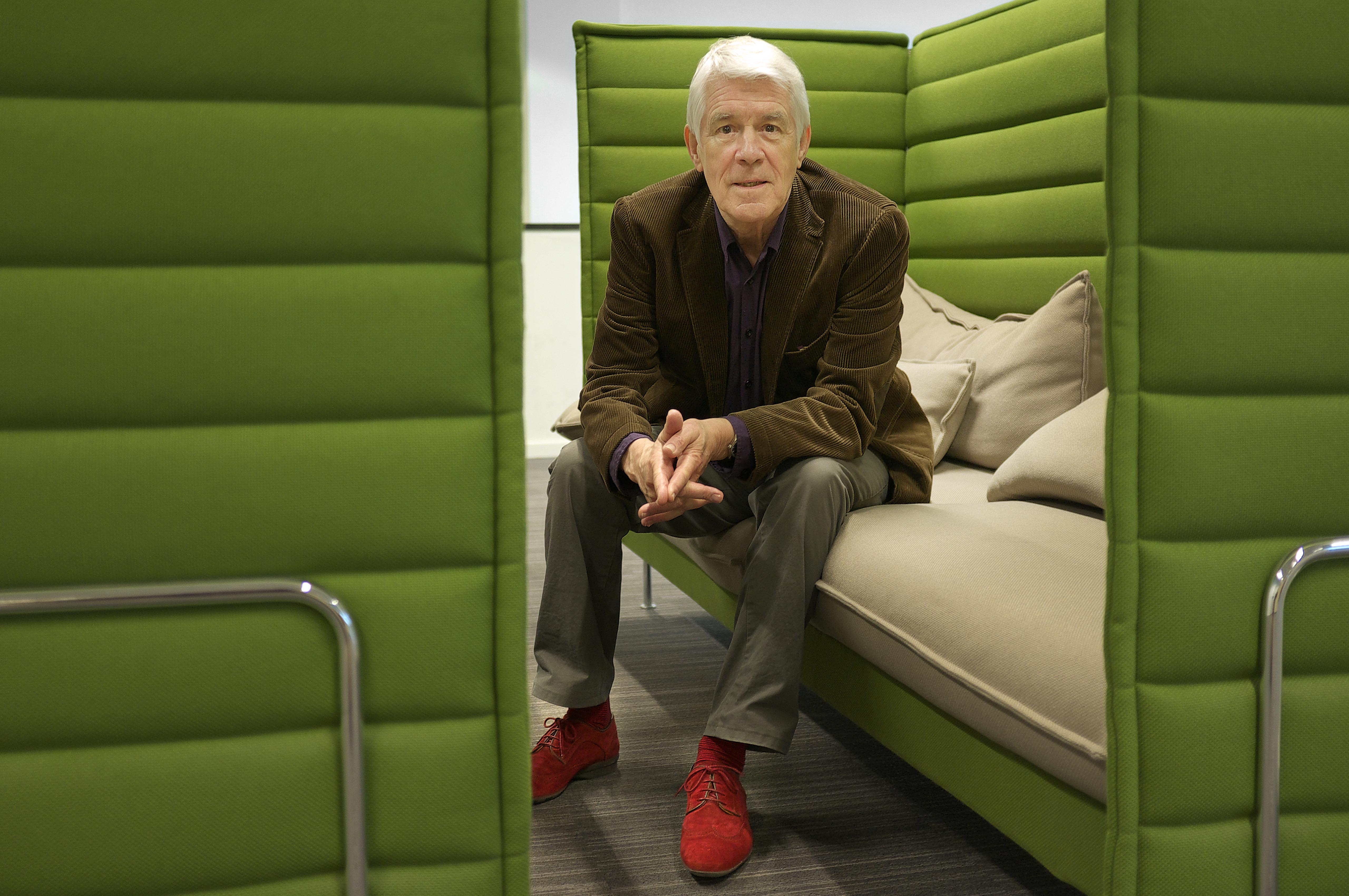 Kees van Kooten, Nederlands schrijver en cabaretier. Zittend op de Alcove highback bank, van Ronan & Erwan Bouroullec